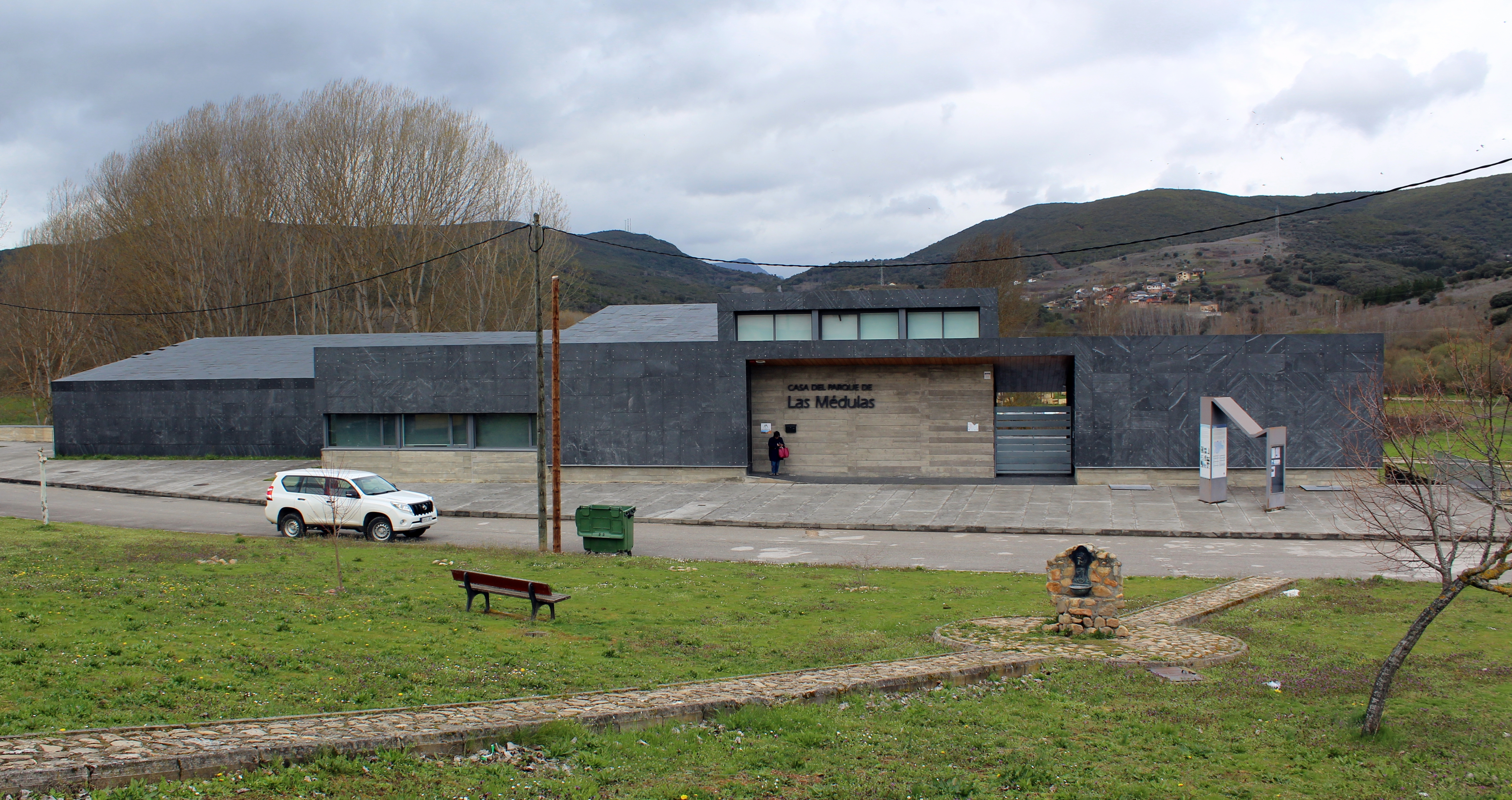 Parque de las Médulas en Carucedo, provincia de León, comarca de El Bierzo.